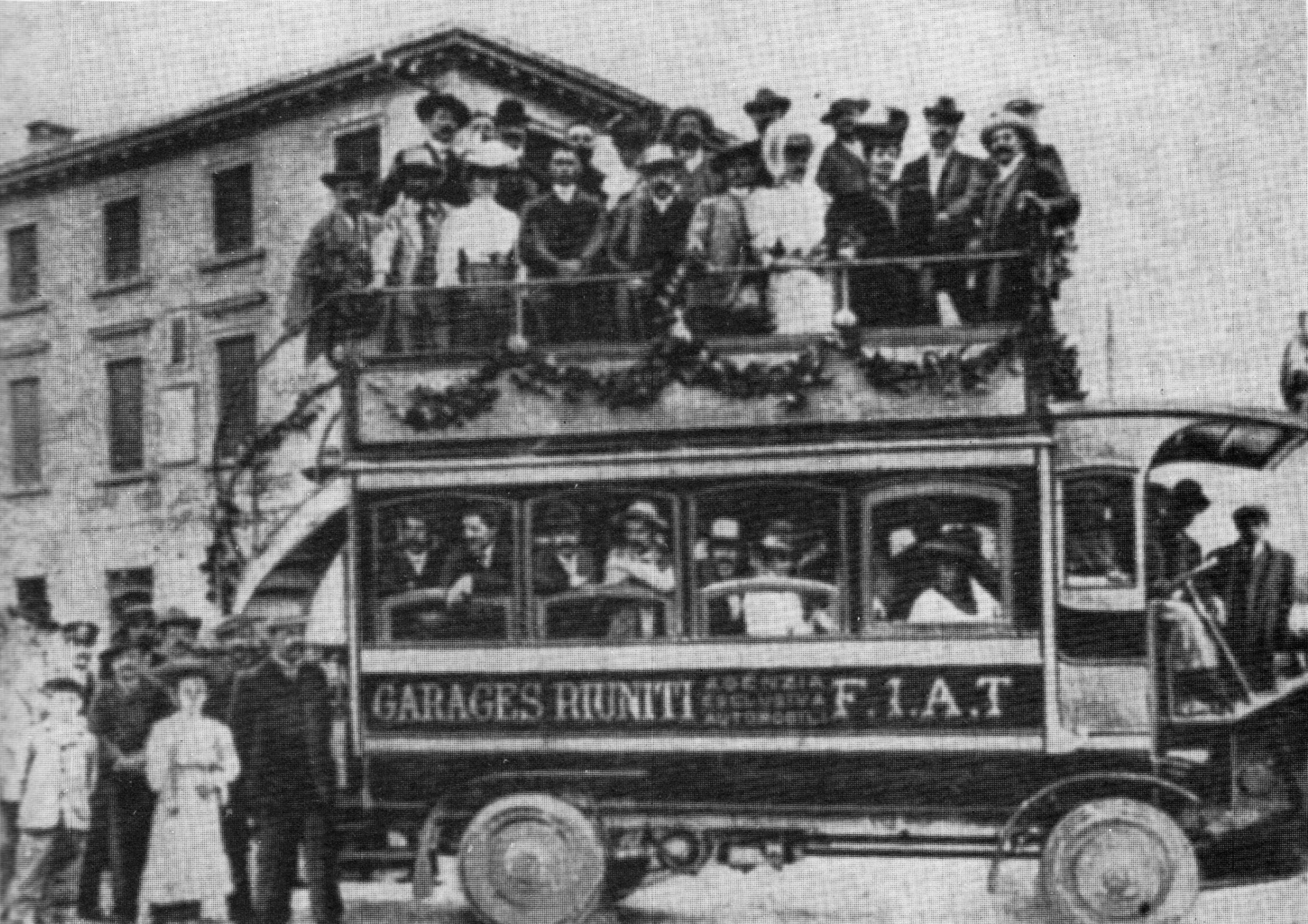 Viaggio inaugurale del servizio di trasporto automobilistico Firenze-Siena